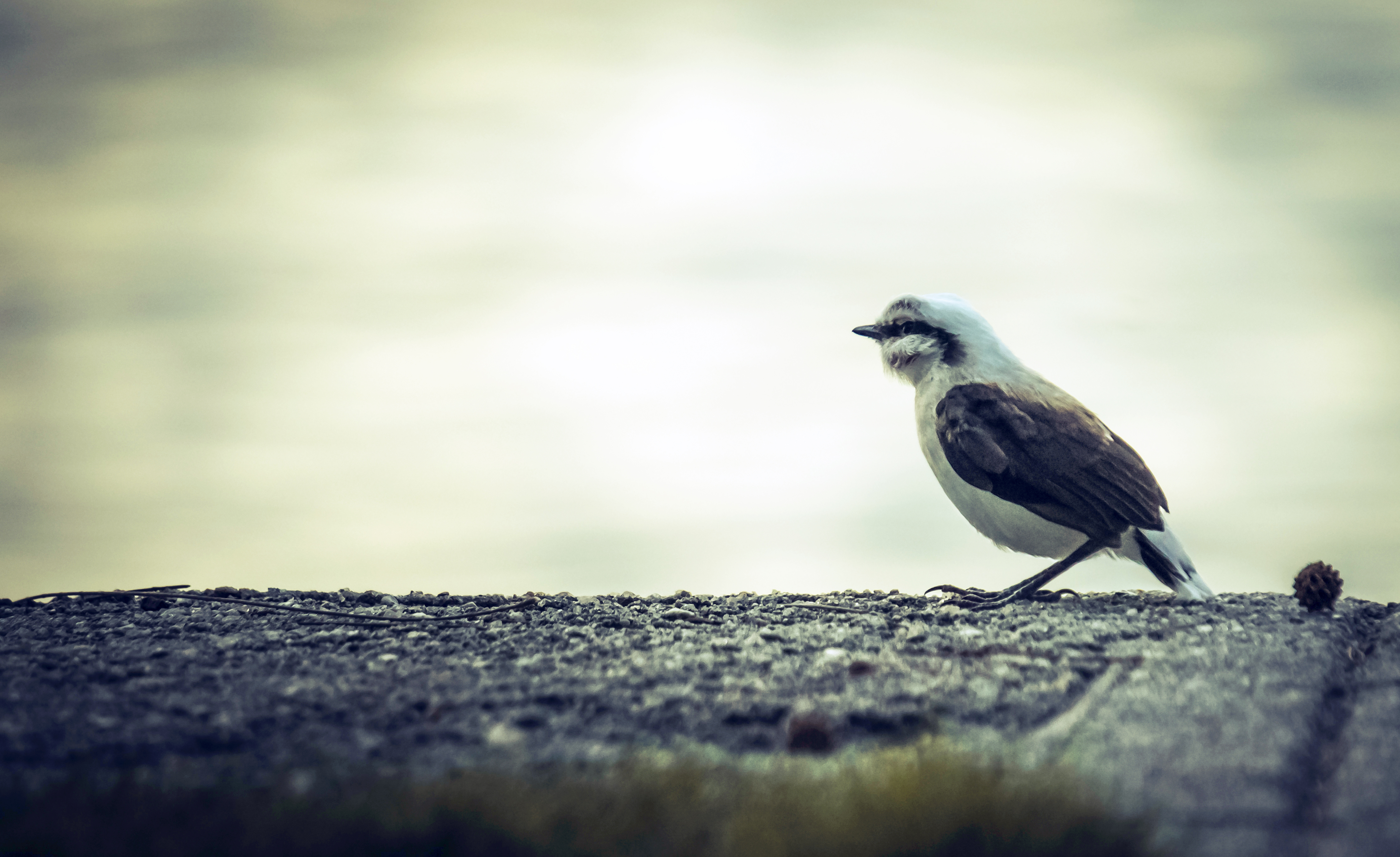 Uma lavadeira na Ilha de Paquetá